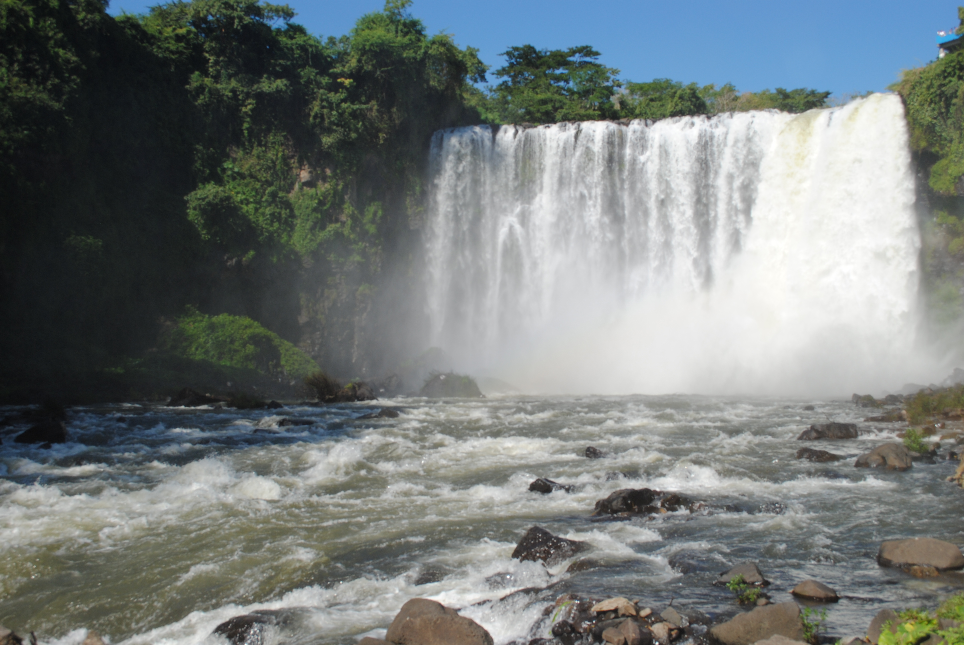 Es una de las cascadas principales para visitar en Catemaco, tiene a su alrededor gran vegetación y se puede observar la naturaleza a su máxima expresión. En los últimos años se volvió más famosa porque ahí se filmó un escena de la película "Apocalypto" de Mel Gibson.